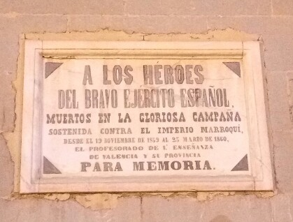 Placa en homenaje a los fallecidos en la Guerra con Marruecos en en Convento de Santo Domingo, Valencia